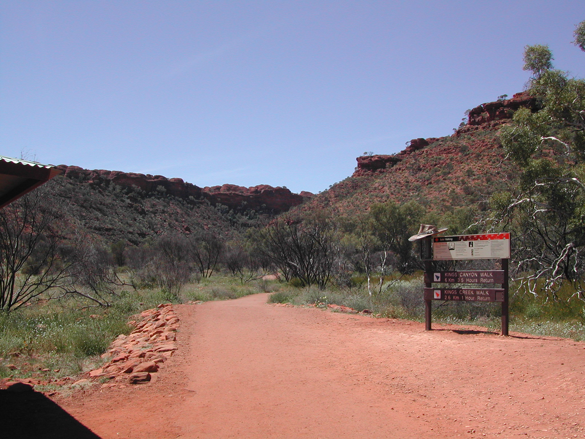 Kings Canyon